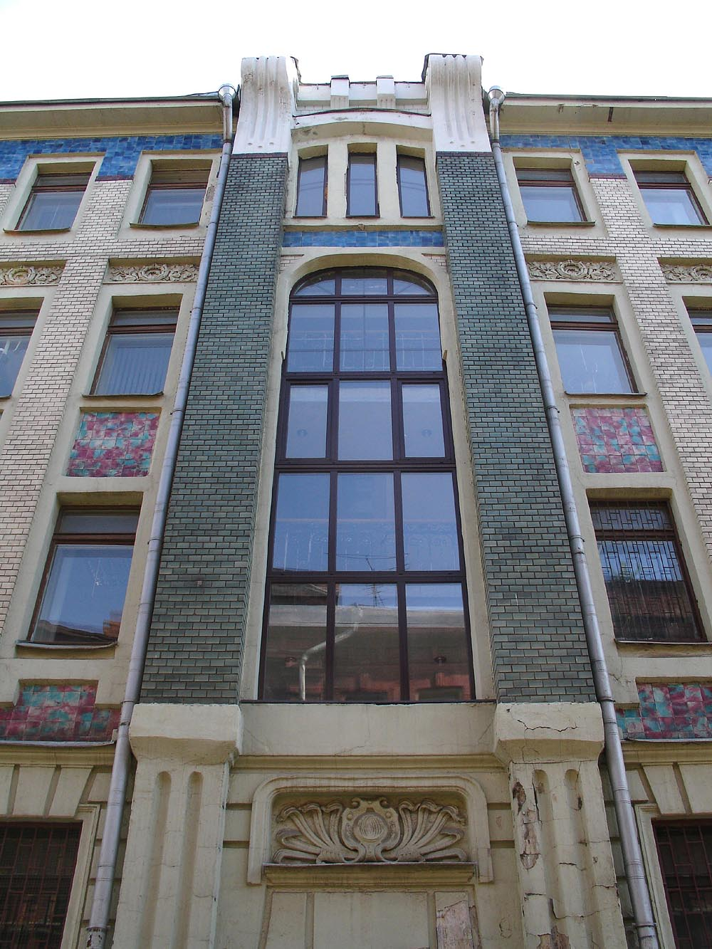 16, Pechatnikov Lane, Moscow